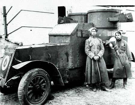 Бойцы армии Украинской Народной Республики рядом с бронеавтомобилем «Швыдкий»